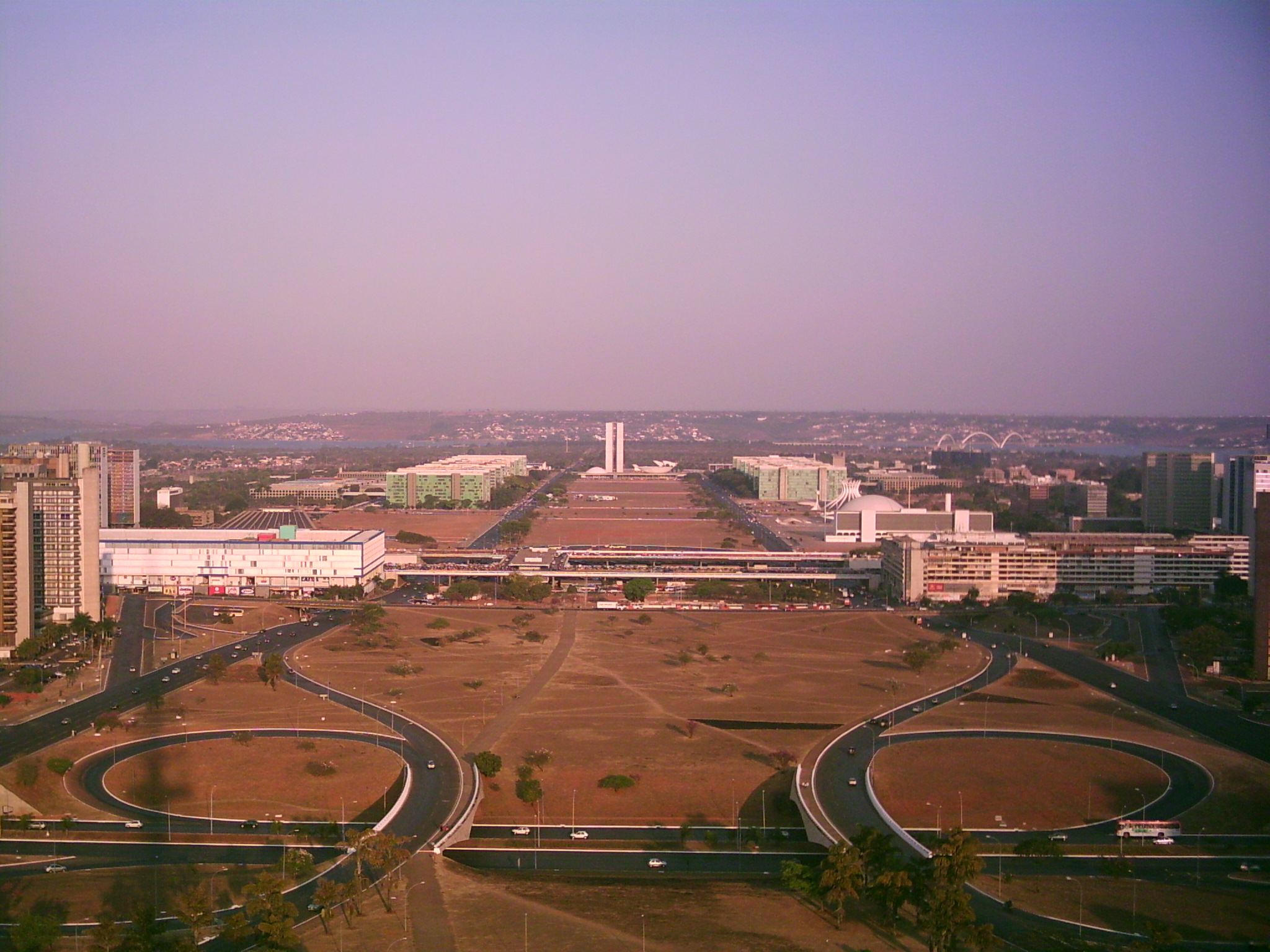 Vista aérea da Esplanada dos Ministérios